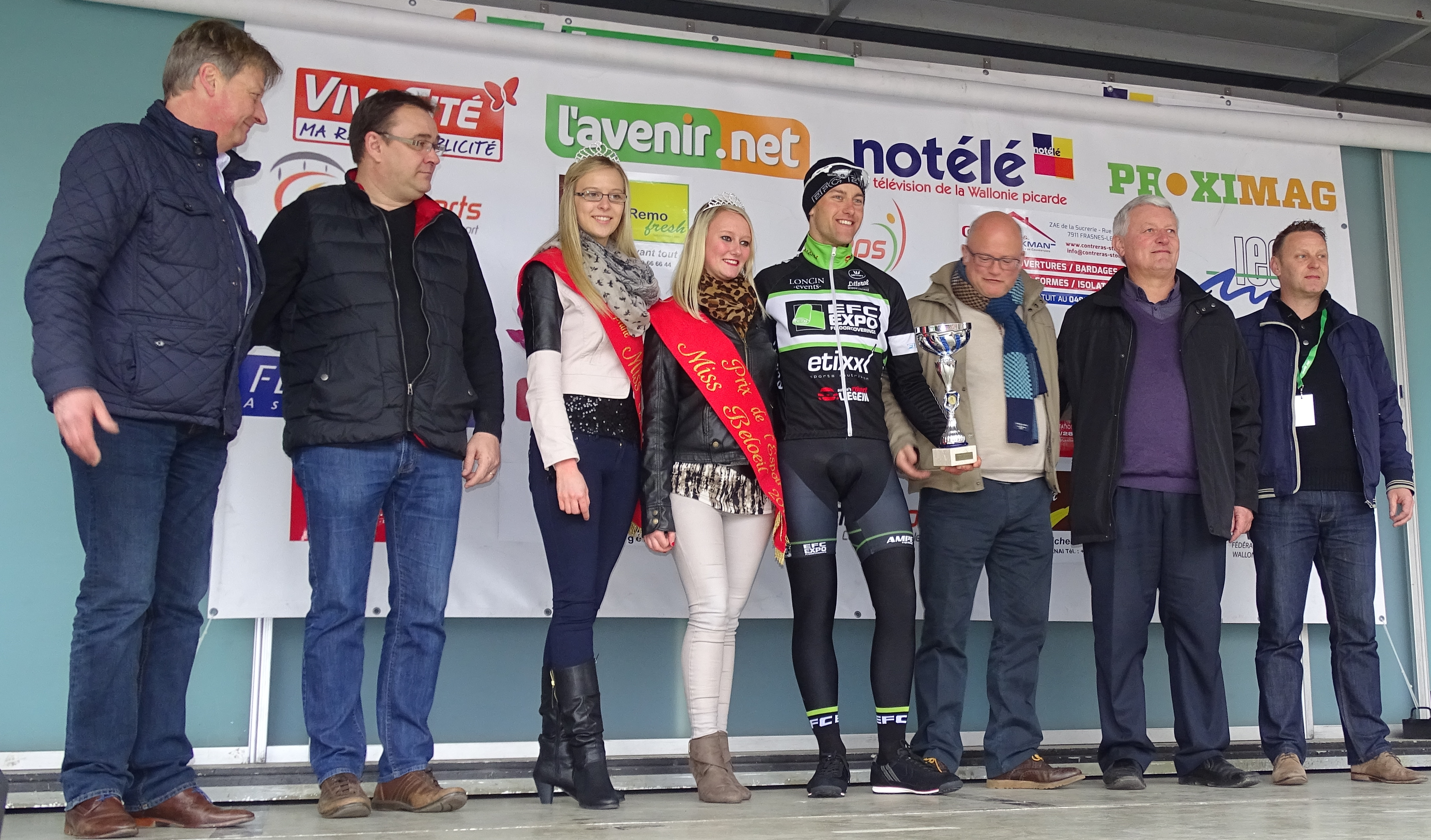 Triptyque des Monts et Châteaux 2015 Depicted team: EFC-Etixx